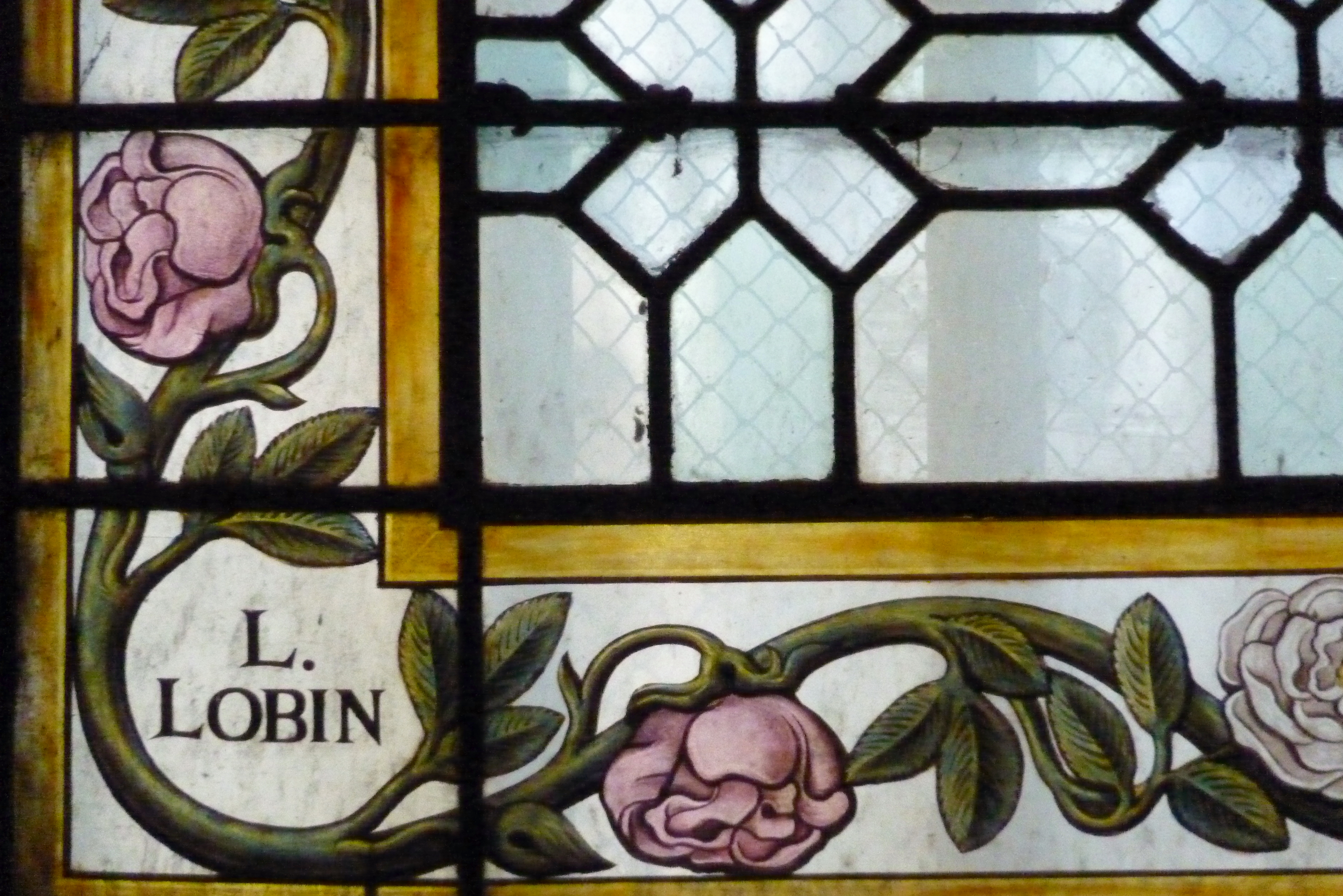 Ausschnitt eines Bleiglasfensters in der katholischen Pfarrkirche Sainte-Élisabeth-de-Hongrie in Paris (3. Arrondissement), Signatur: "L. Lobin" Lucien-Leopold Lobin (1837–1892) DescriptionFrench stained-glass artist and painterDate of birth/death 1837 1892Location of birth/death Tours ToursWork location ToursAuthority control : Q18901086